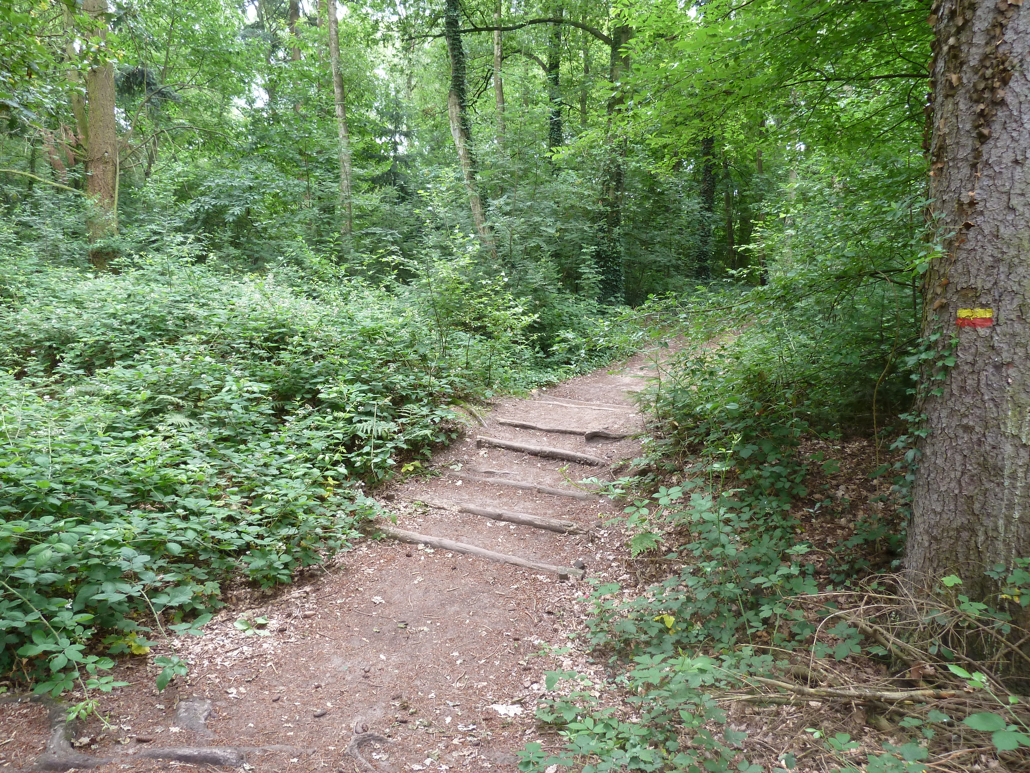 Veedrift bij landweer De Wolfsgraaf te Groenewoud, Swalmen, Limburg, Nederland